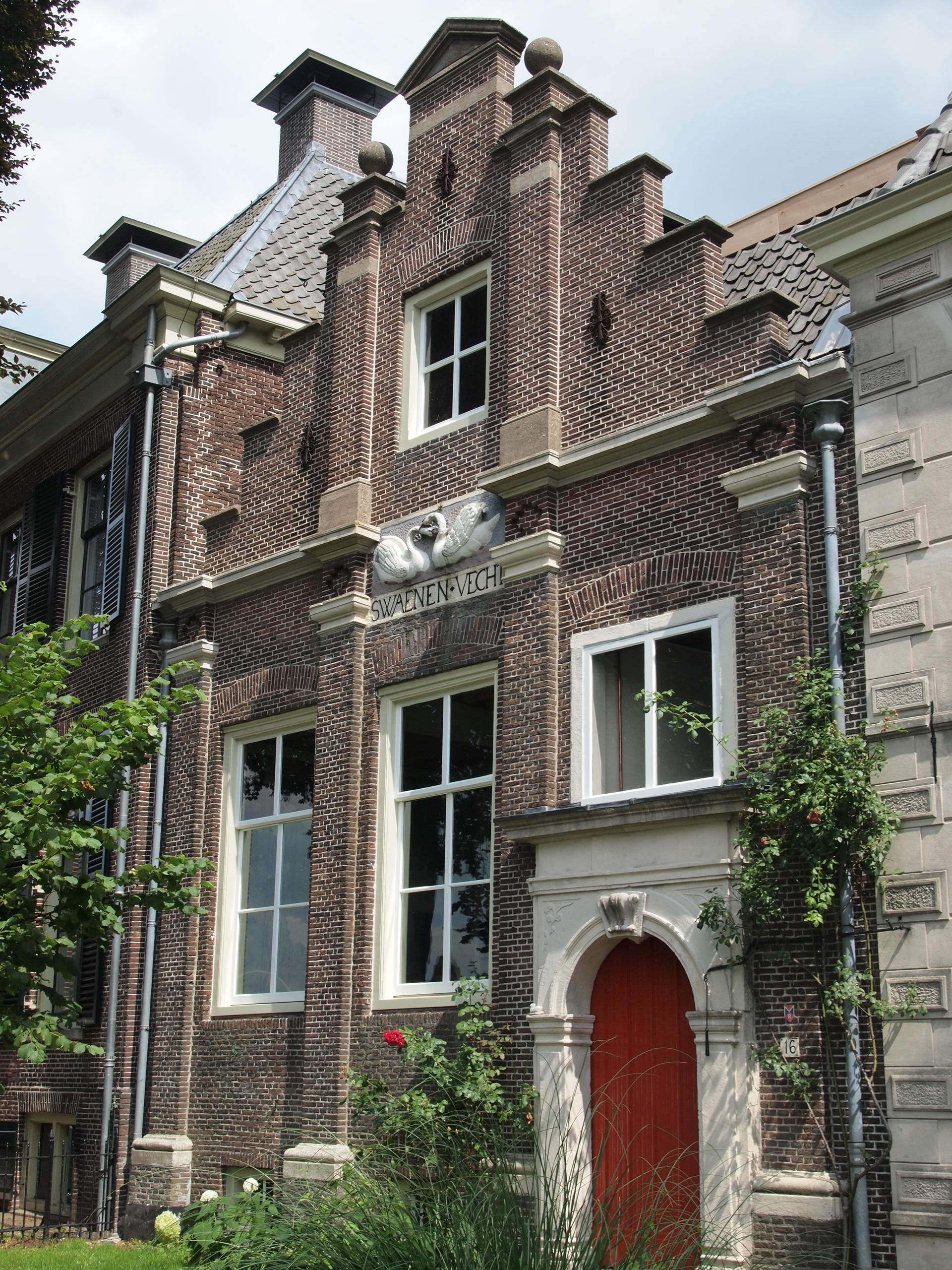 Dorpsstraat 16, Oud-Zuilen